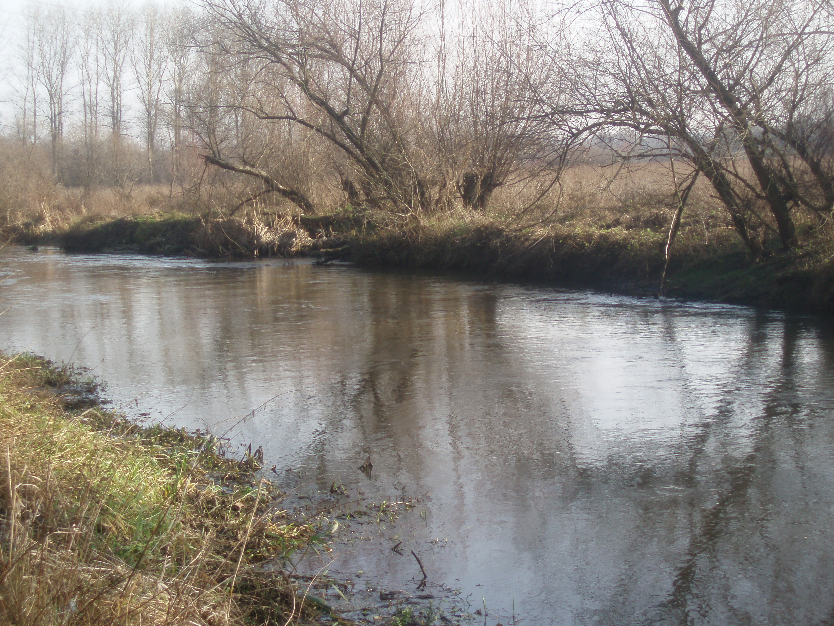 Warta w okolicach Częstochowy.